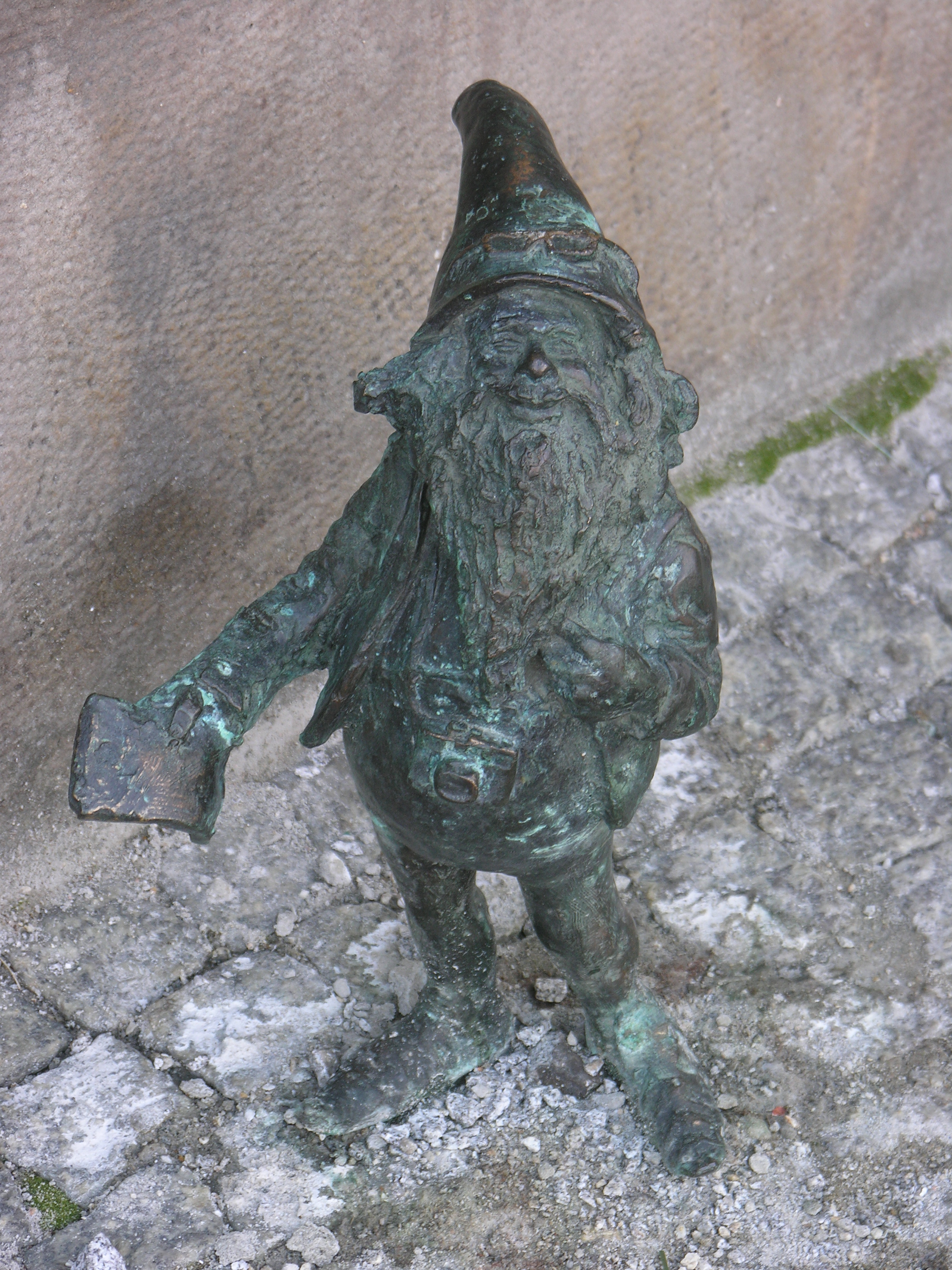 Wrocław. Krasnal Podróżnik Turysta. Porównaj z Wroclaw krasnal Podroznik.JPG